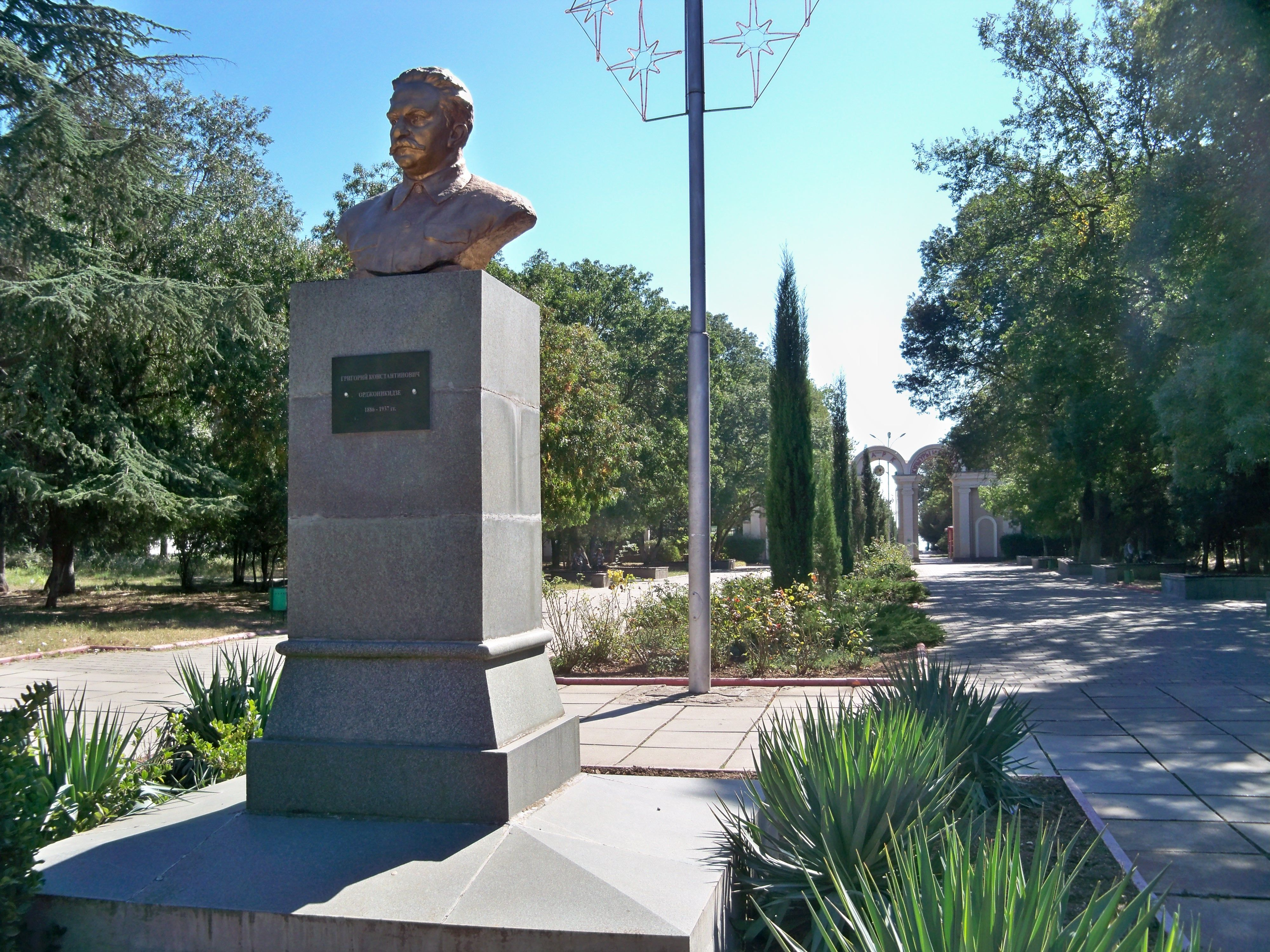 Пам'ятник Г. К. Орджонікідзе., Керч, вул. Орджонікідзе, біля входу в парк